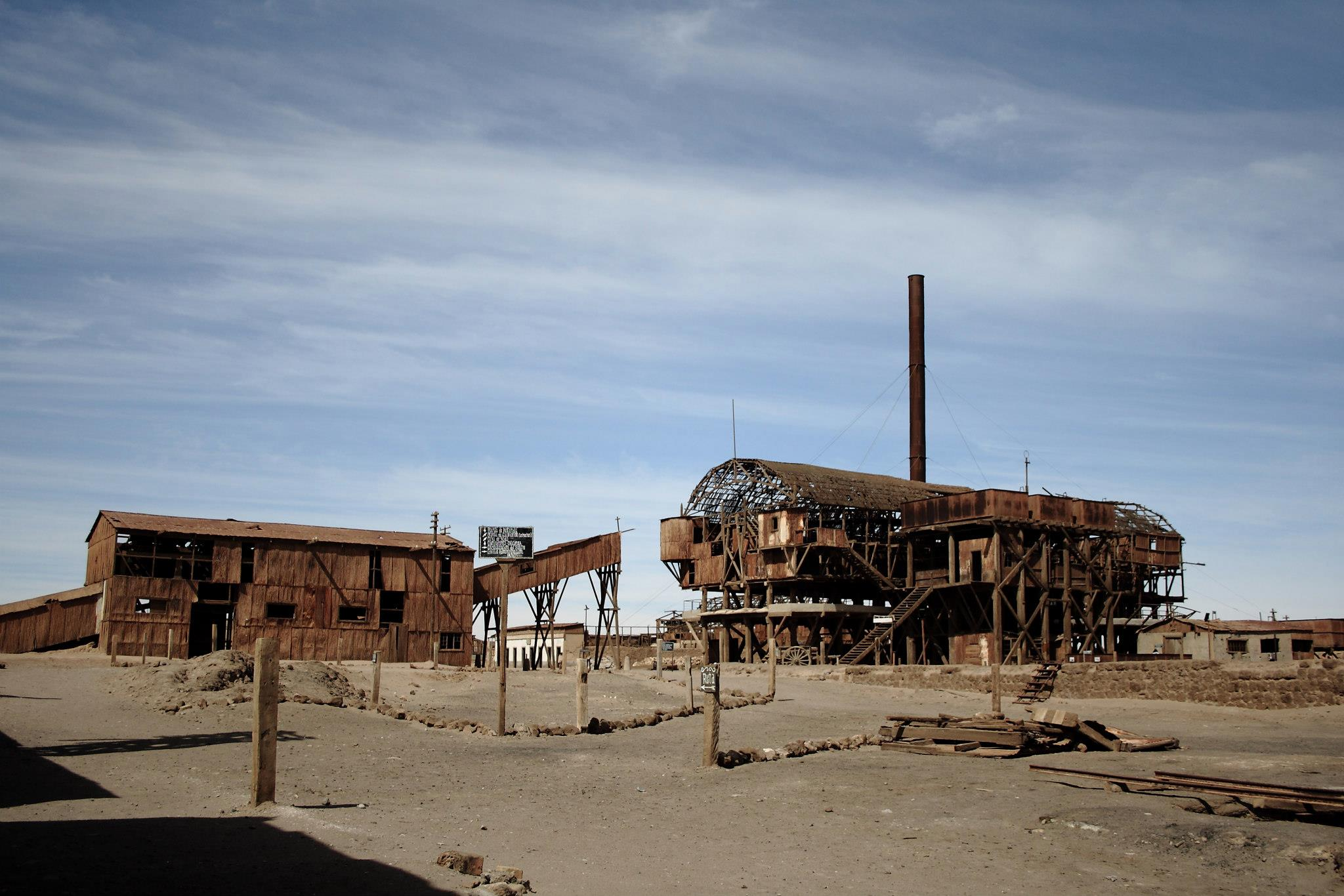 sector donde se procesaba el salitre.